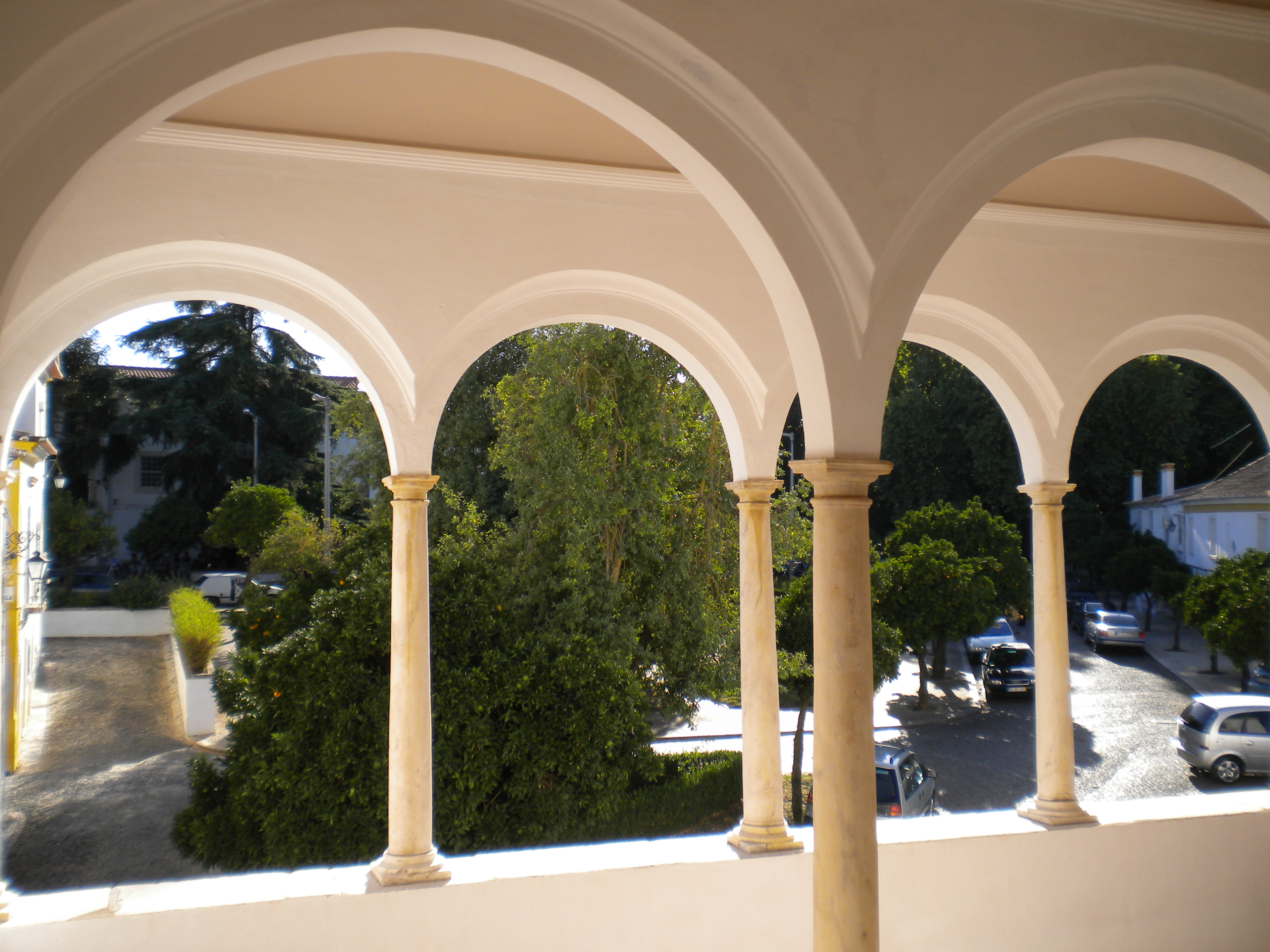 Claustro